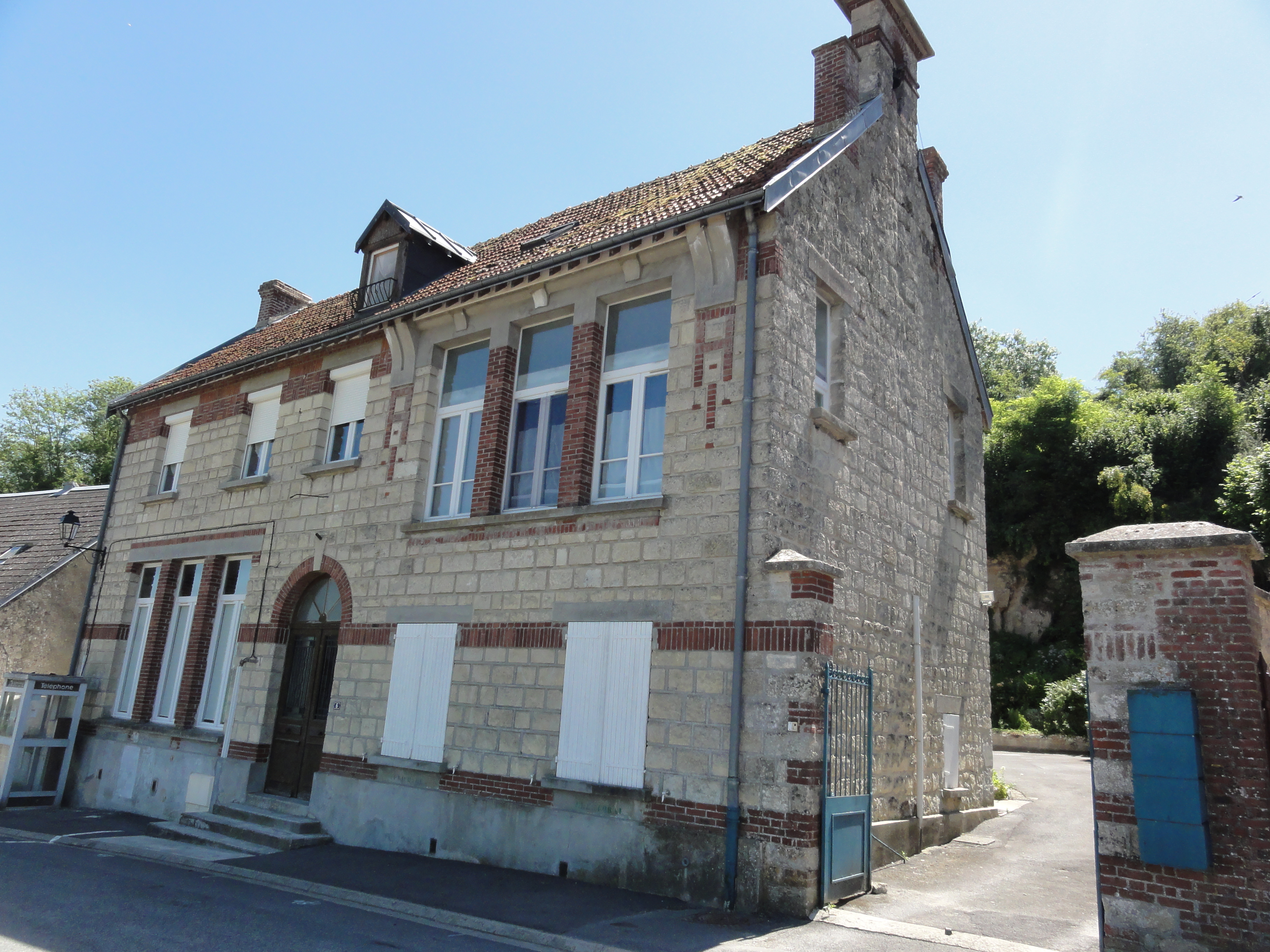 Serval (Aisne) mairie